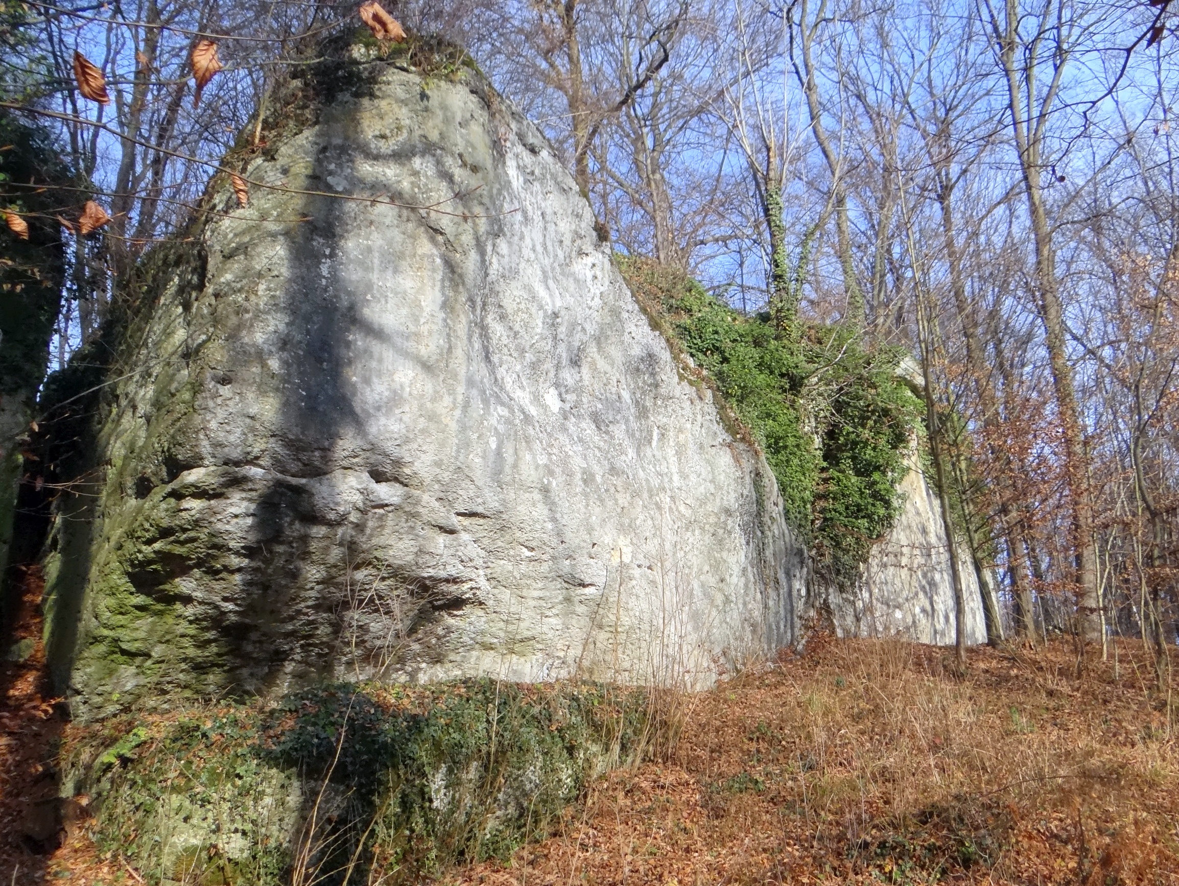 Mały Mur w Zimnym Dole (Czułów)